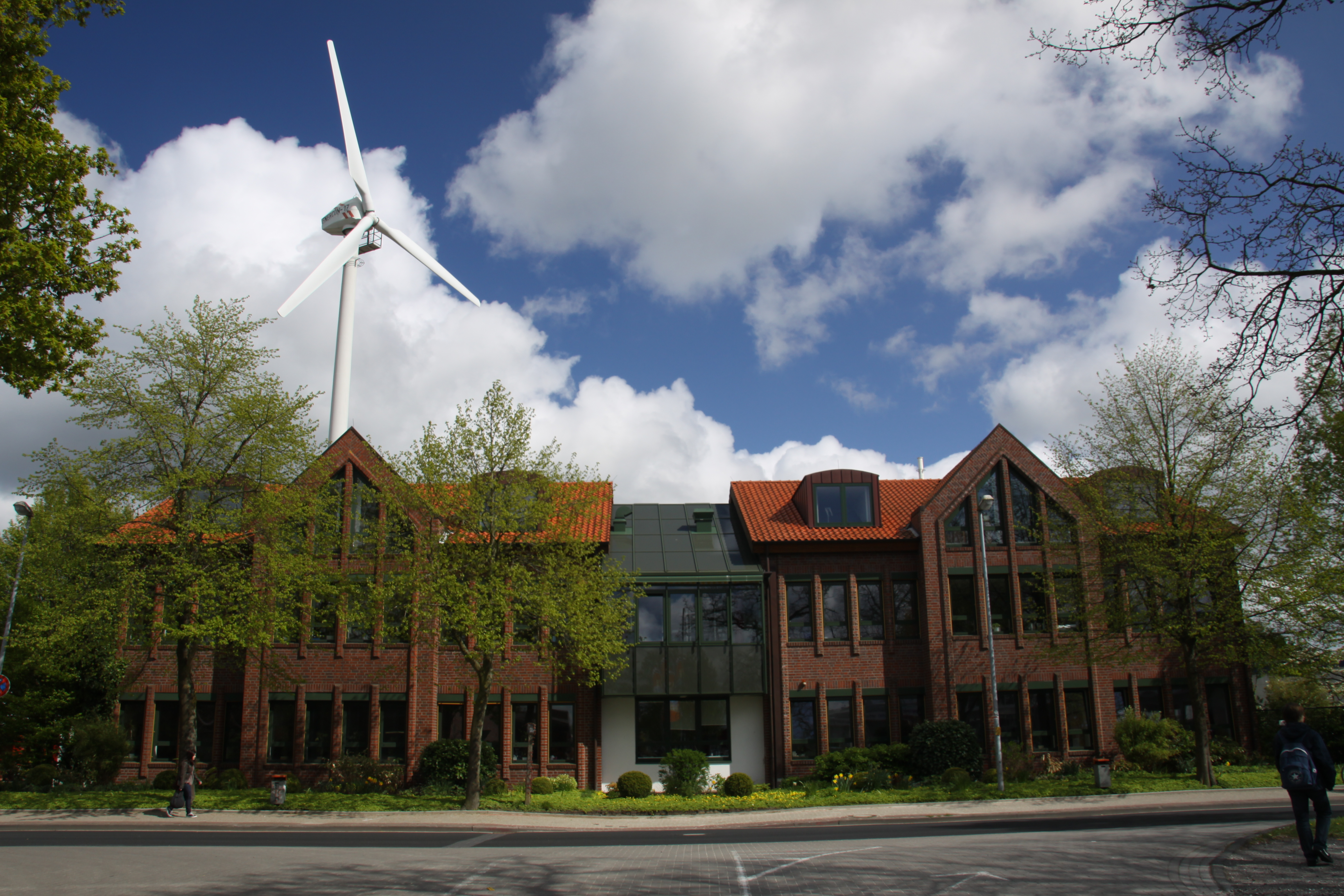 Enercon-Verwaltung in Aurich